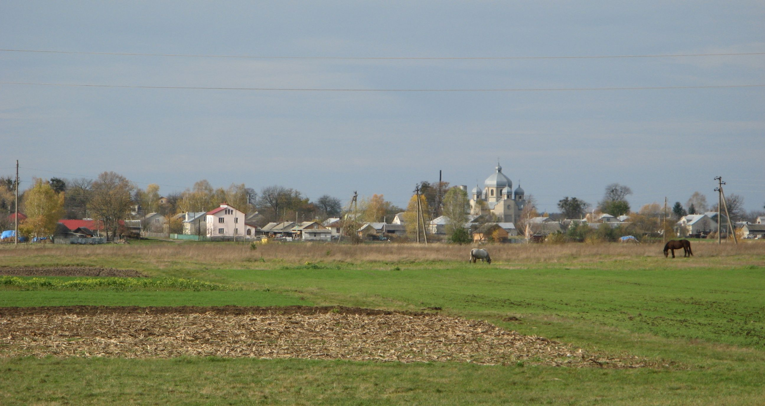 Центральна частина села Топорів (Буський р-н, Львівська обл.)